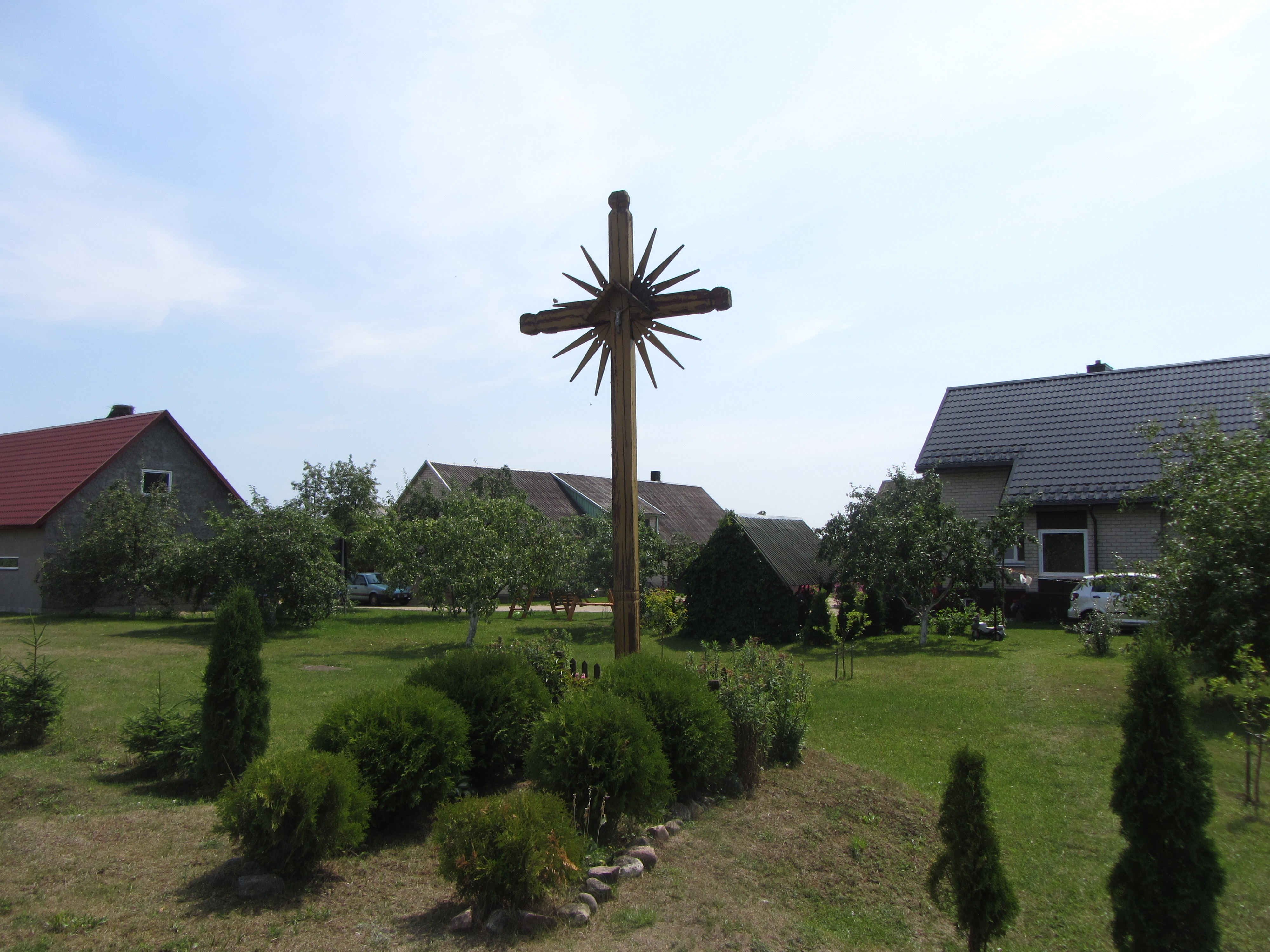 Snaigupė 66382, Lithuania